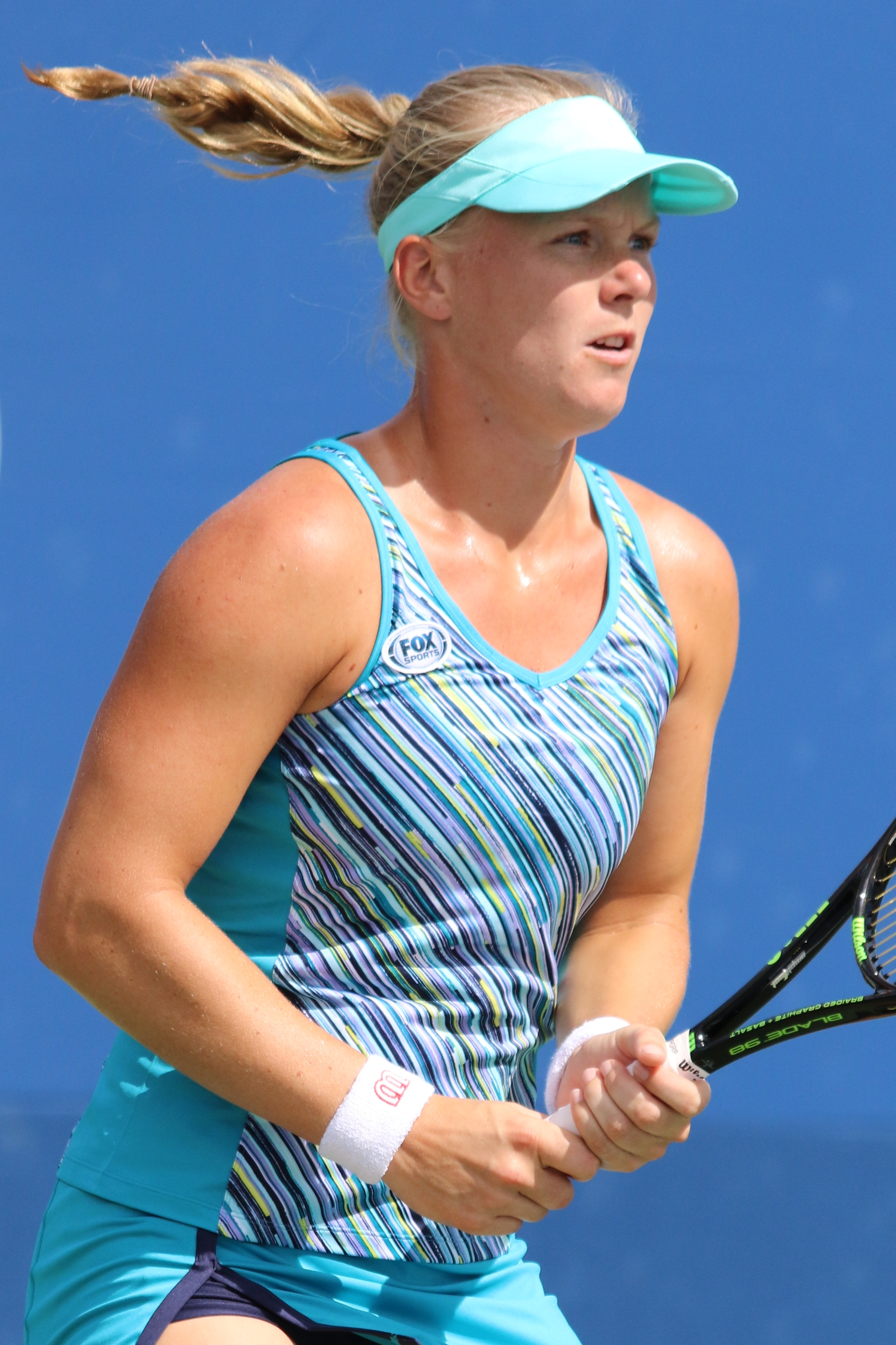 Bertens US16 (22)